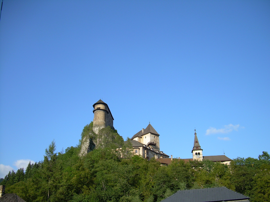 Árva vára (Szlovákia)